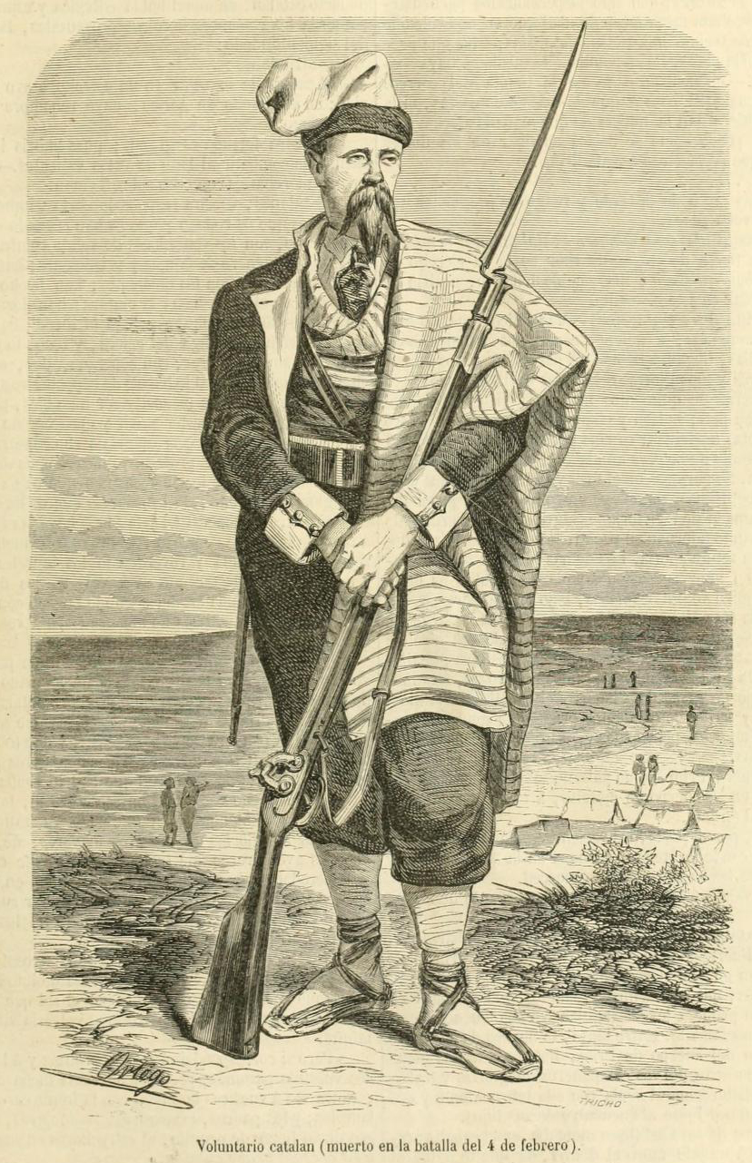 Voluntario catalán en la guerra de África.